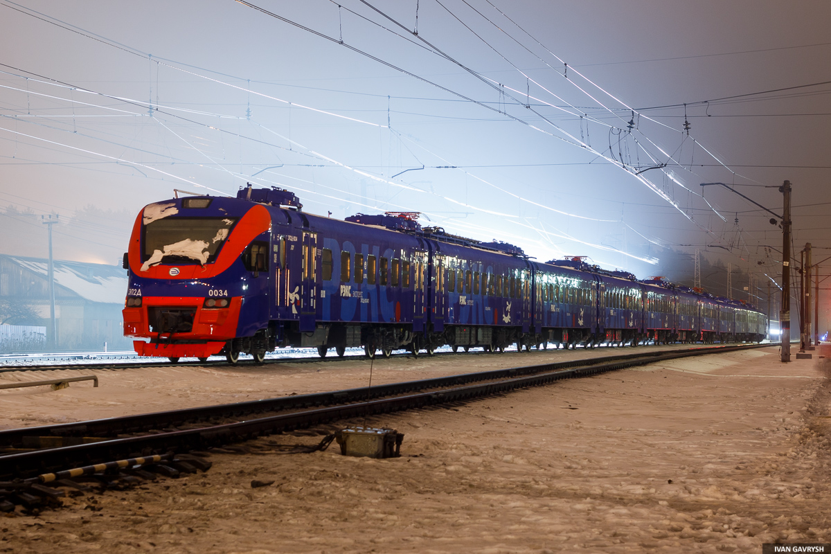 Электропоезд ЭП2Д-0034 построен ОАО «ДМЗ» в 11-вагонной составности С завода нёс бренд «РЭКС.Регион-экспресс» Вагоны имели прислонно-сдвижные герметизированные двери с выходом на высокие платформы, салоны второго класса С завода поступил в собственность ОАО «Центральная ППК» 07.12.2017 — прибыл на техническое обслуживание в ТЧ-17 МСК Нахабино 28.12.2017 — запущен на маршрут Москва — Шаховская